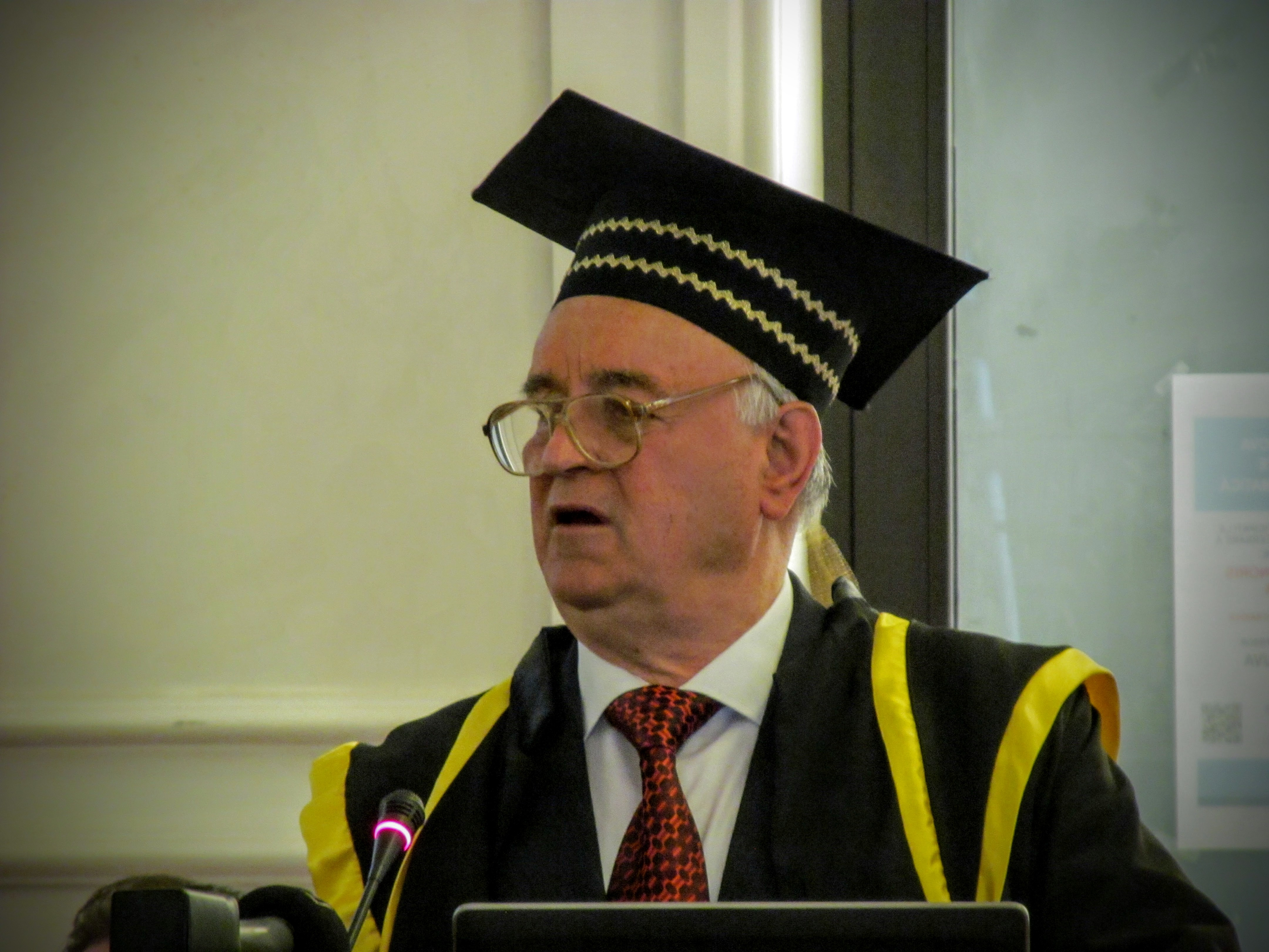 Ceremonia de decernare a titlului de Doctor Honoris Causa al Universitatii din Craiova - Prof. univ. dr. Ion Văduva